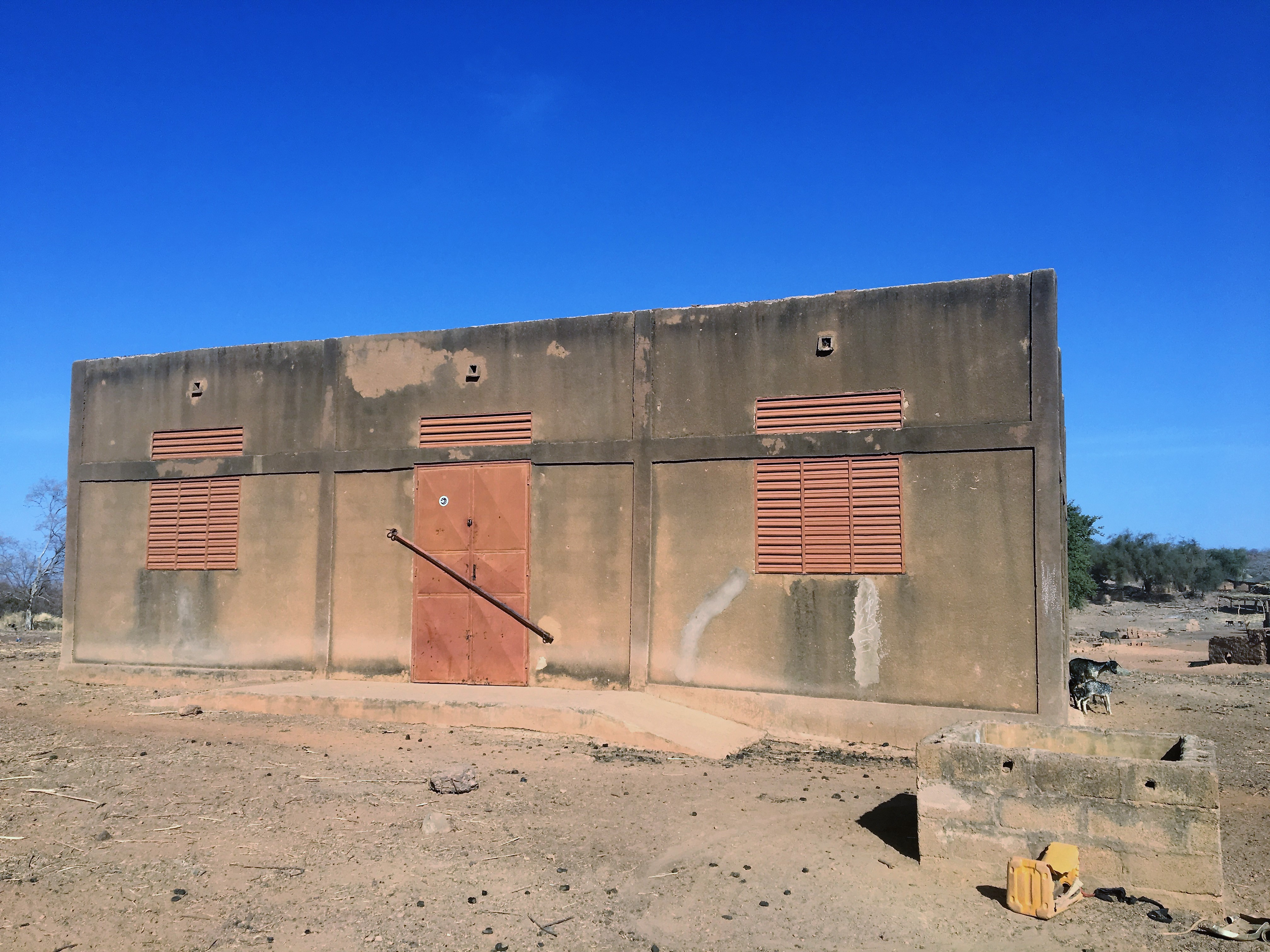 Banque de céréales de Bogonam Mossi